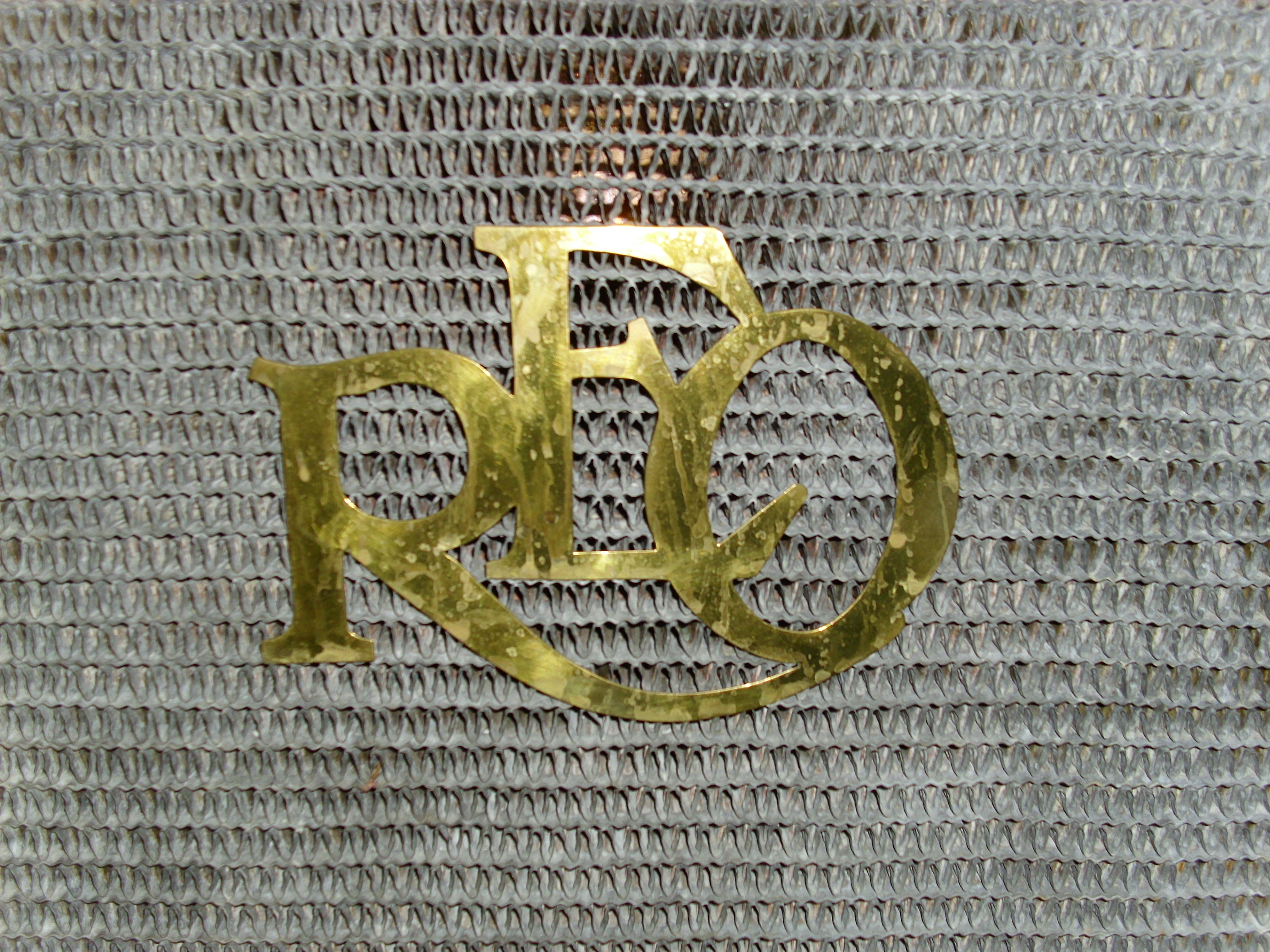 Emblem REO